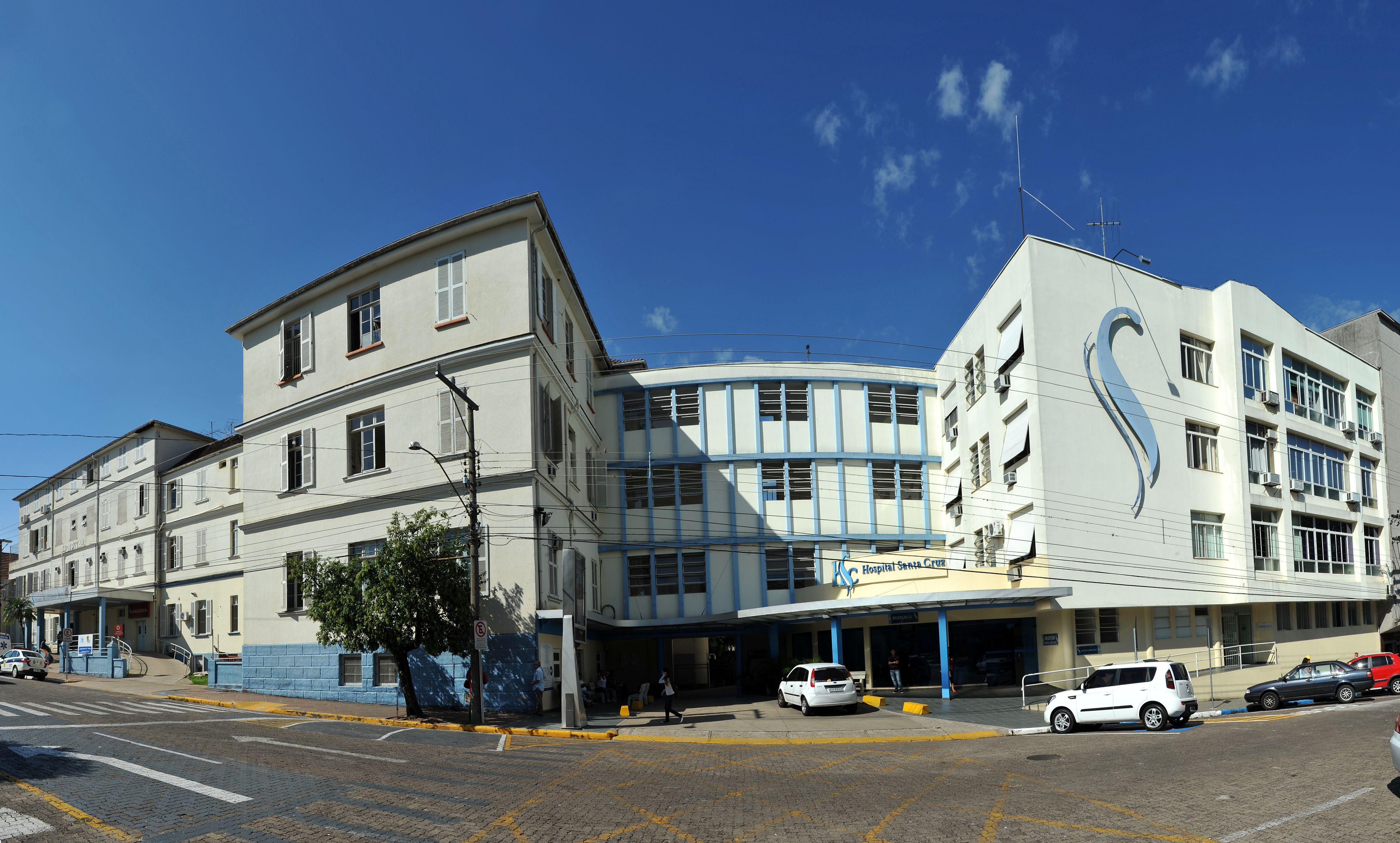 Fonte: Assessoria de Imprensa